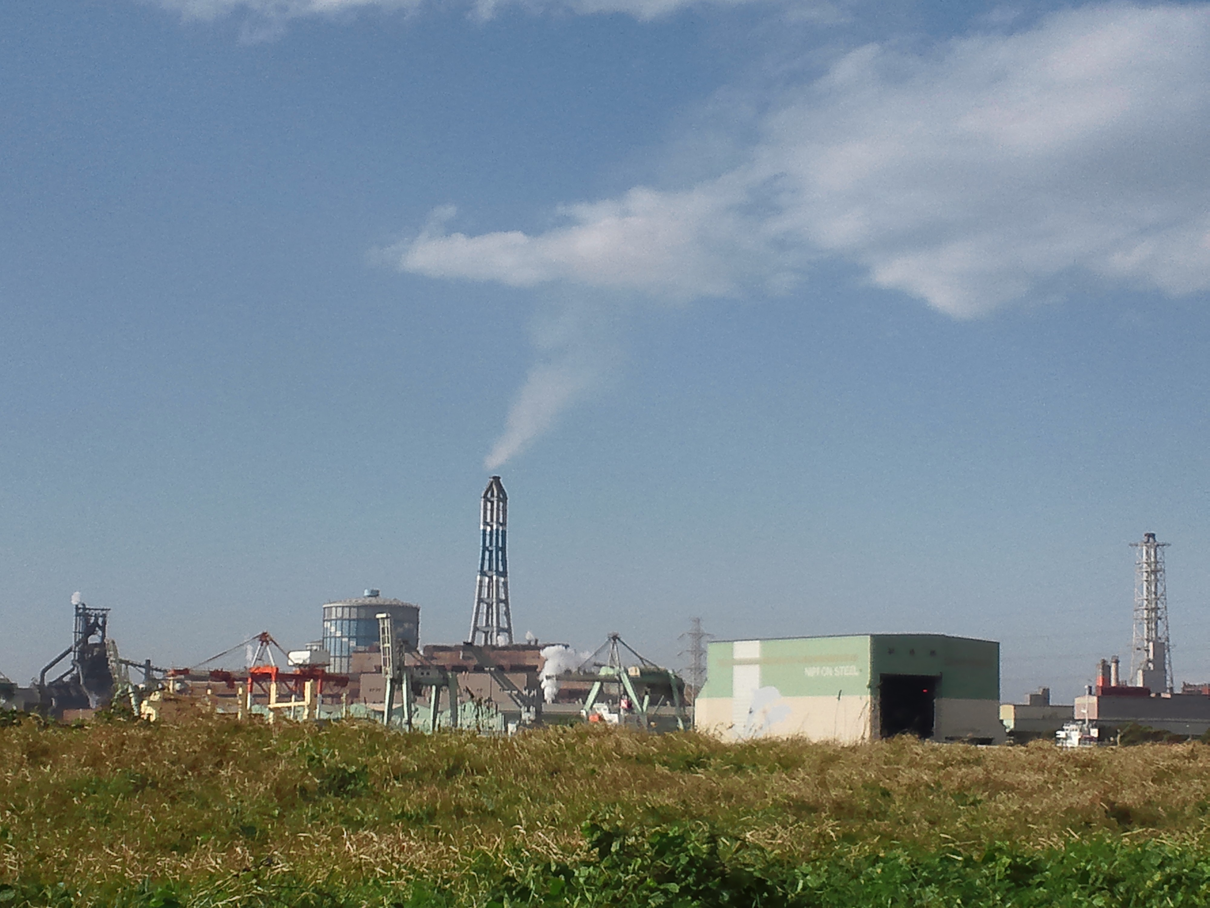 君津共同火力君津共同発電所